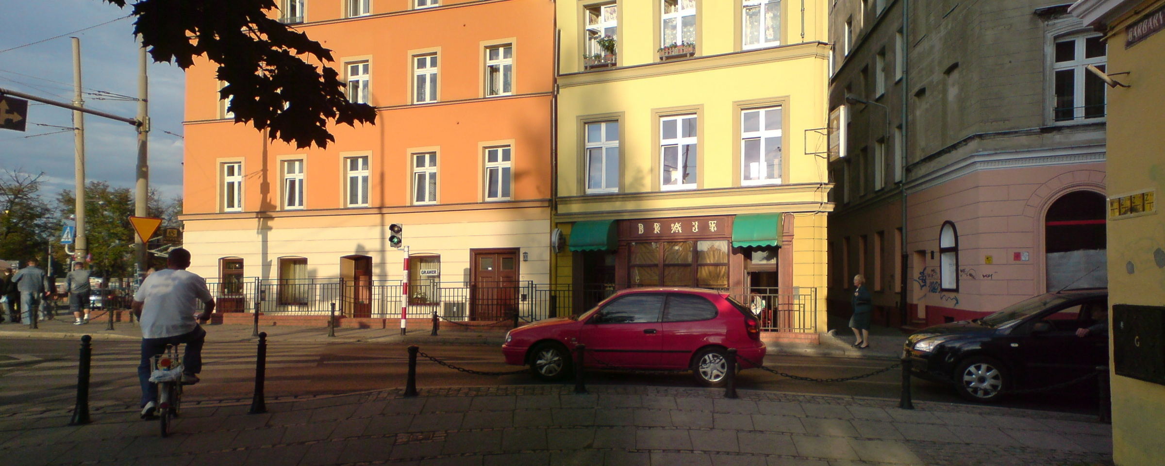 Wrocław, miejsce, w którym niegdyś znajdowała się Brama Odrzańska: skrzyżowanie ulicy Odrzańskiej (prostopadłej do osi zdjęcia, na ulicy stoją dwa samochody czekające na zmianę świateł) i zaułka ul. Garbary (wzdłuż osi zdjęcia); po lewej na skraju kadru widoczna ul. Grodzka.